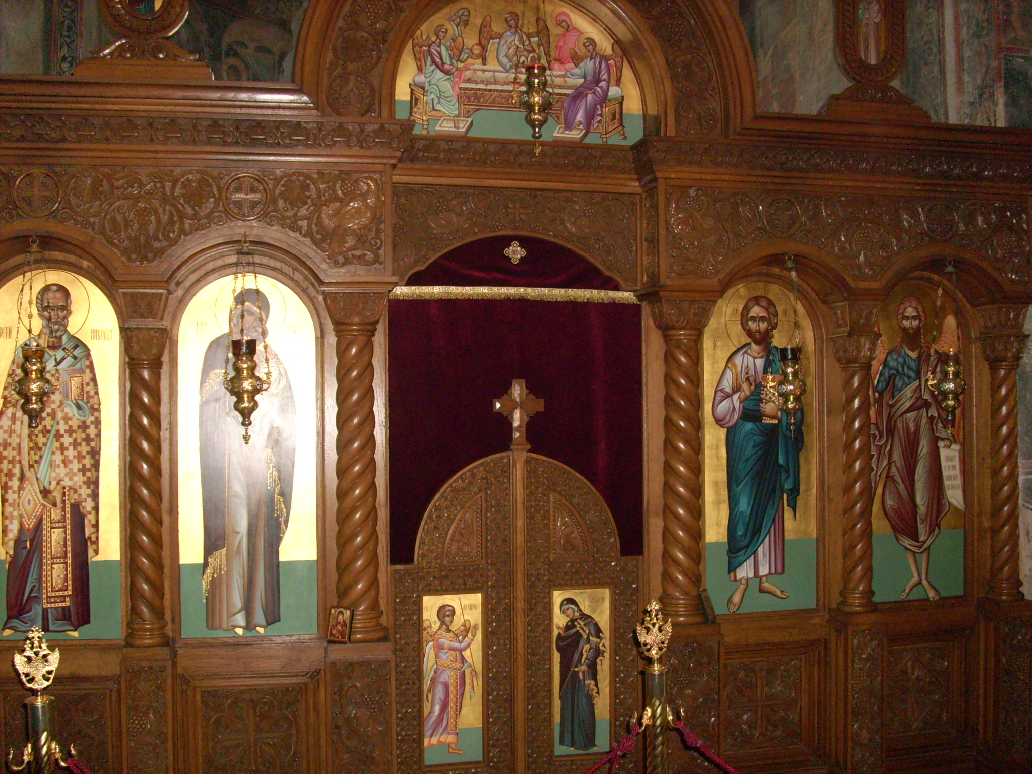 Манастир Ново Хопово се налази на падини јужних обронака Фрушке горе, недалеко од Ирига.